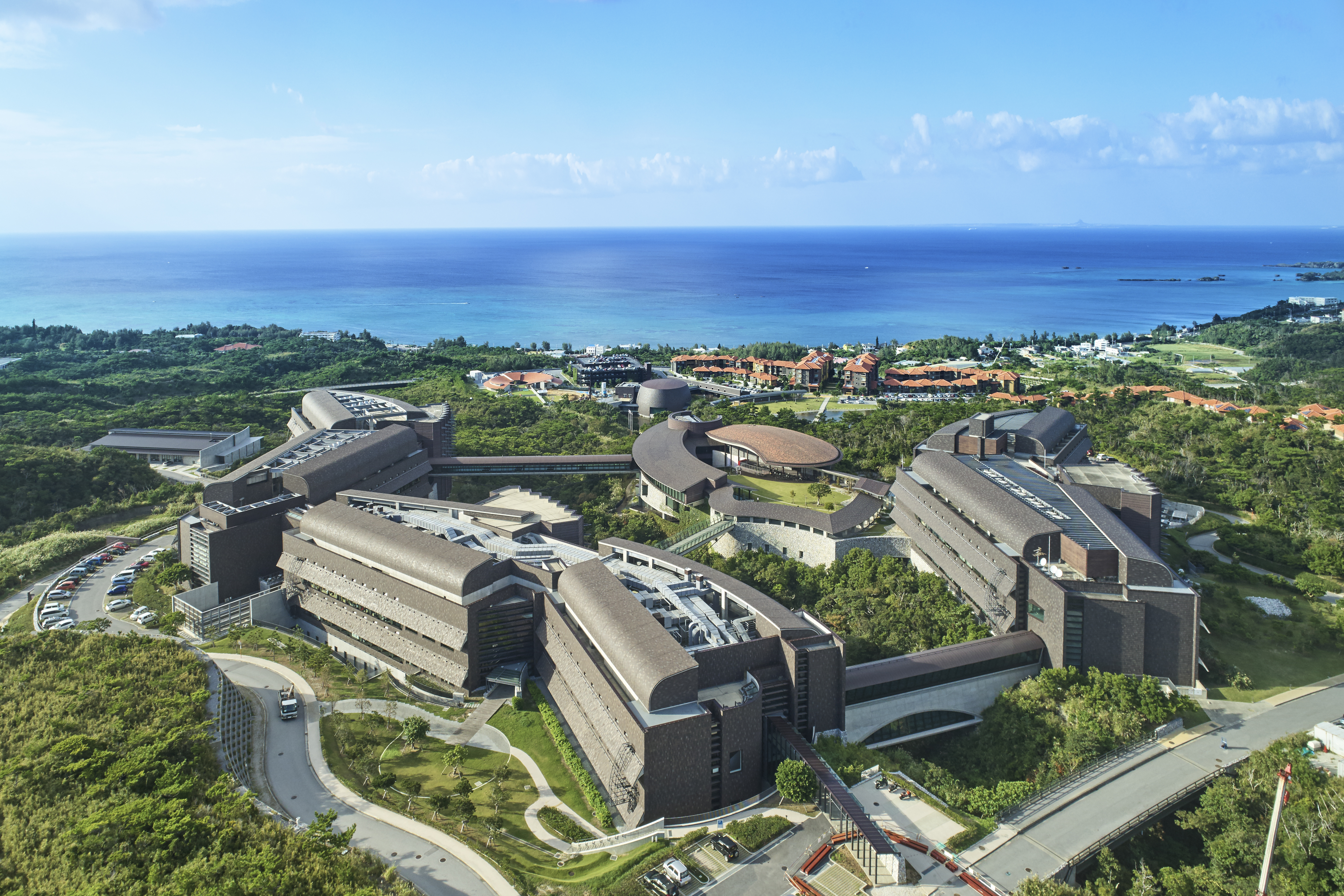 俯瞰から見たOISTキャンパスの建物